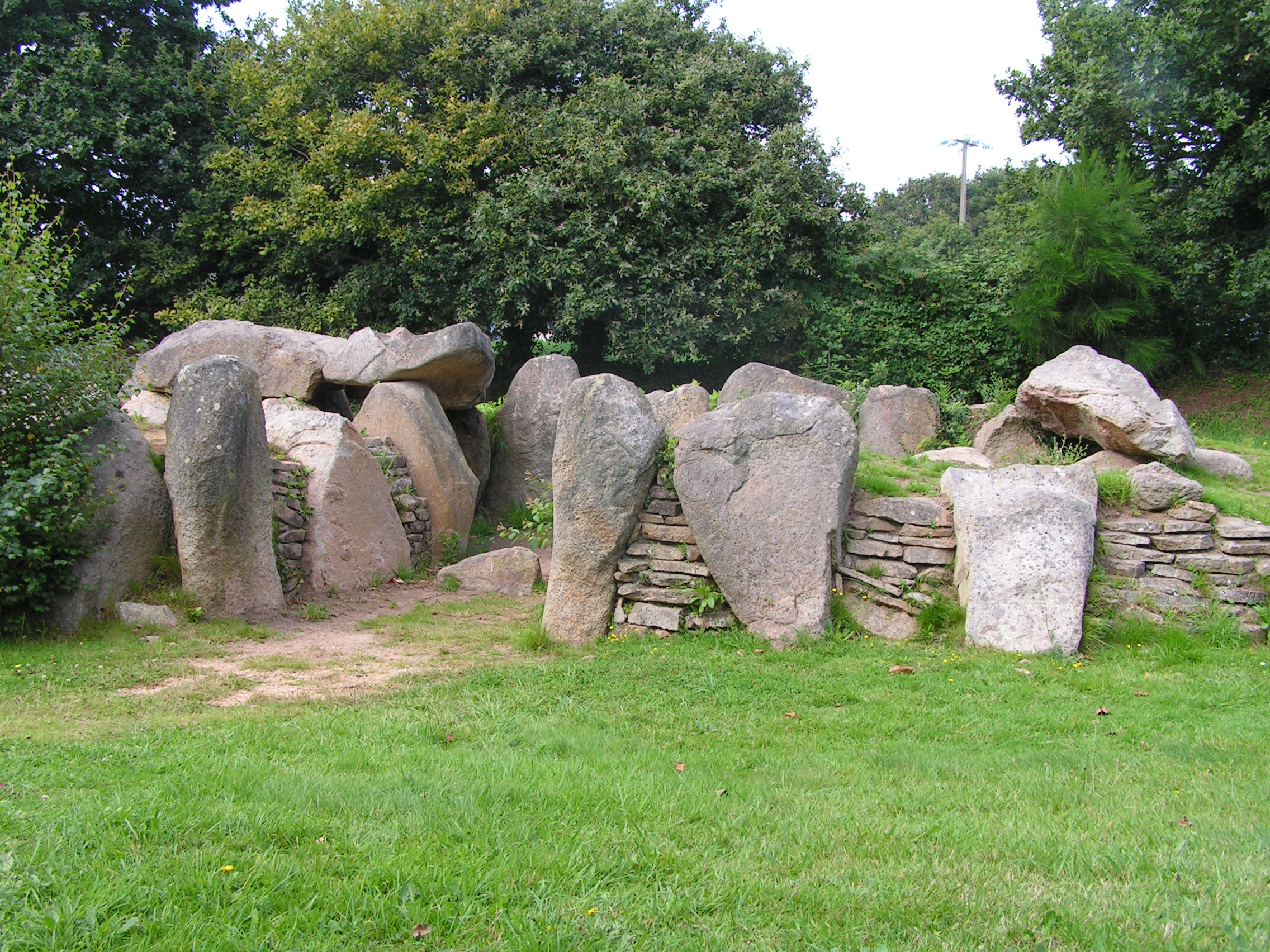 Allée couverte de Crec'h Quillié en Saint-Quay-Perros, entrée de la chambre funéraire